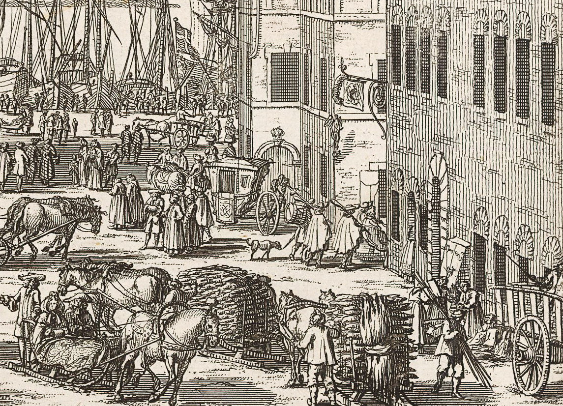 Järntorget i Stockholm, detalj med apoteket Engelens skylt i kvarteret Narcissus och krogen Blå Örns skylt i kvarteret Medusa